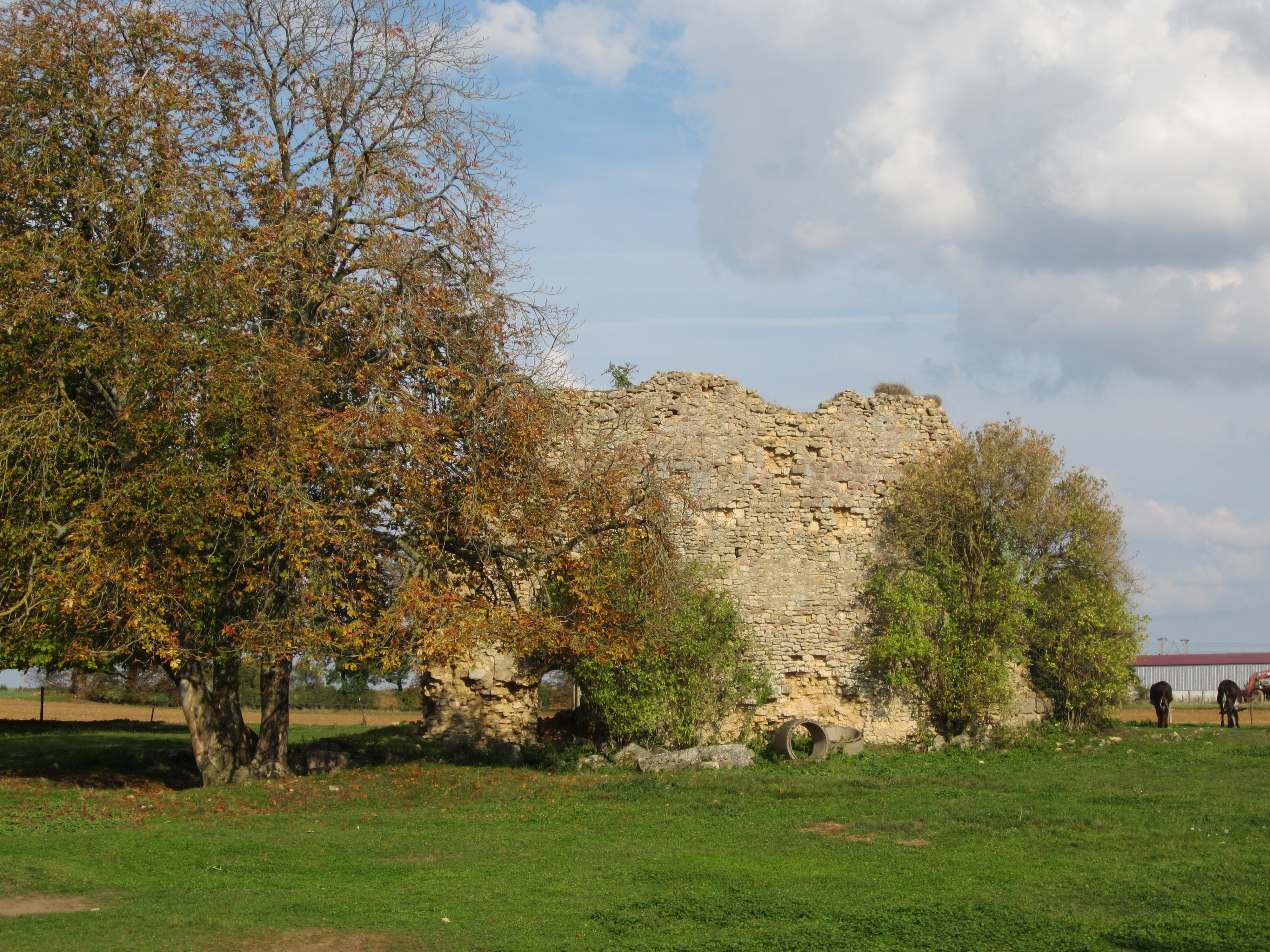 Description vestiges chateau st Baussant vestiges chateau st Baussant